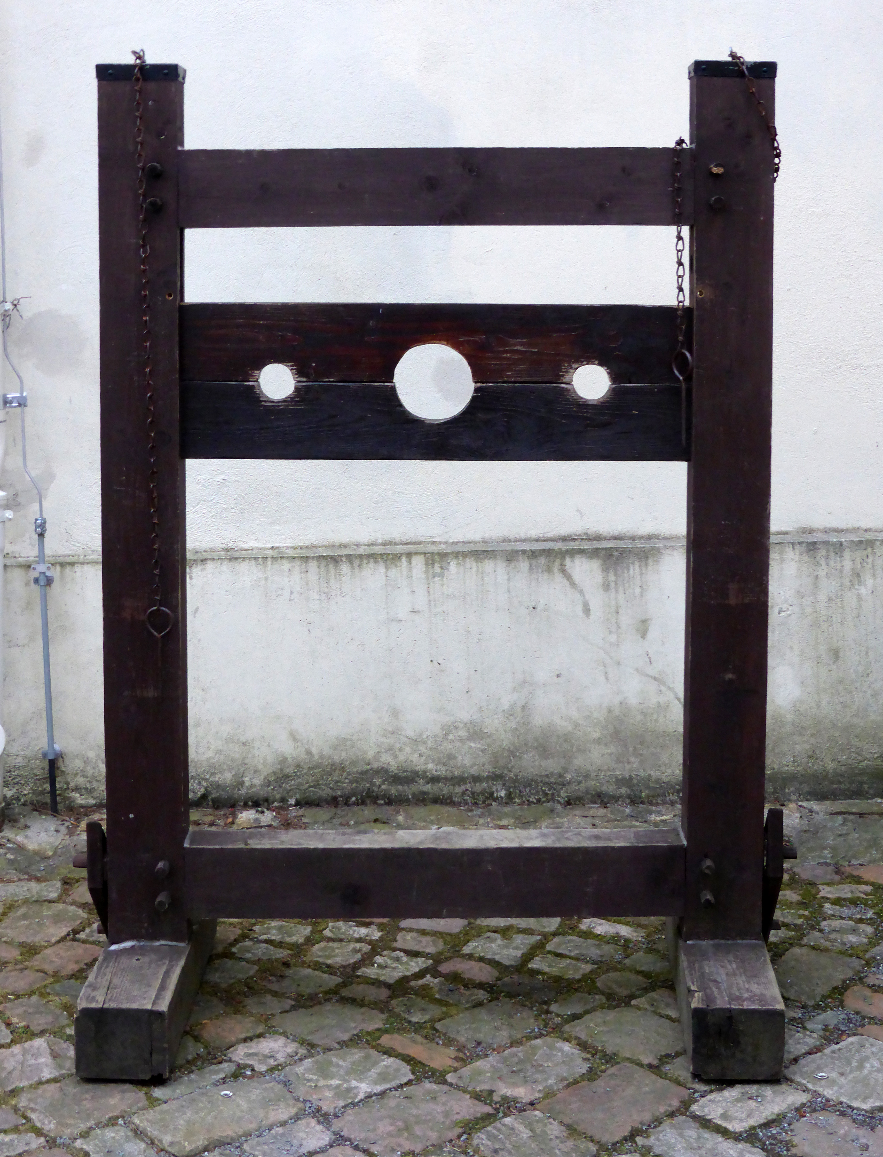 Pranger (Block), Schloss Schlettau - Schlettau, Erzgebirgskreis - Sachsen.